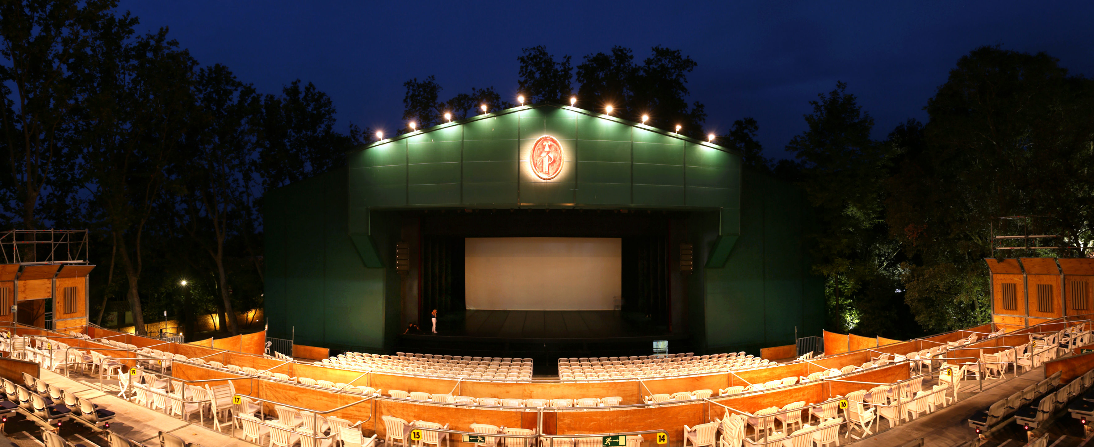 Auditori Parc del Castell del Festival Castell de Peralada